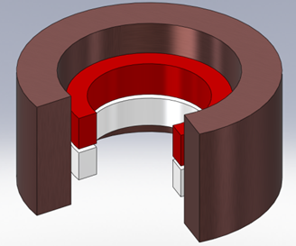 Kopparcylinder innehållande magnet.